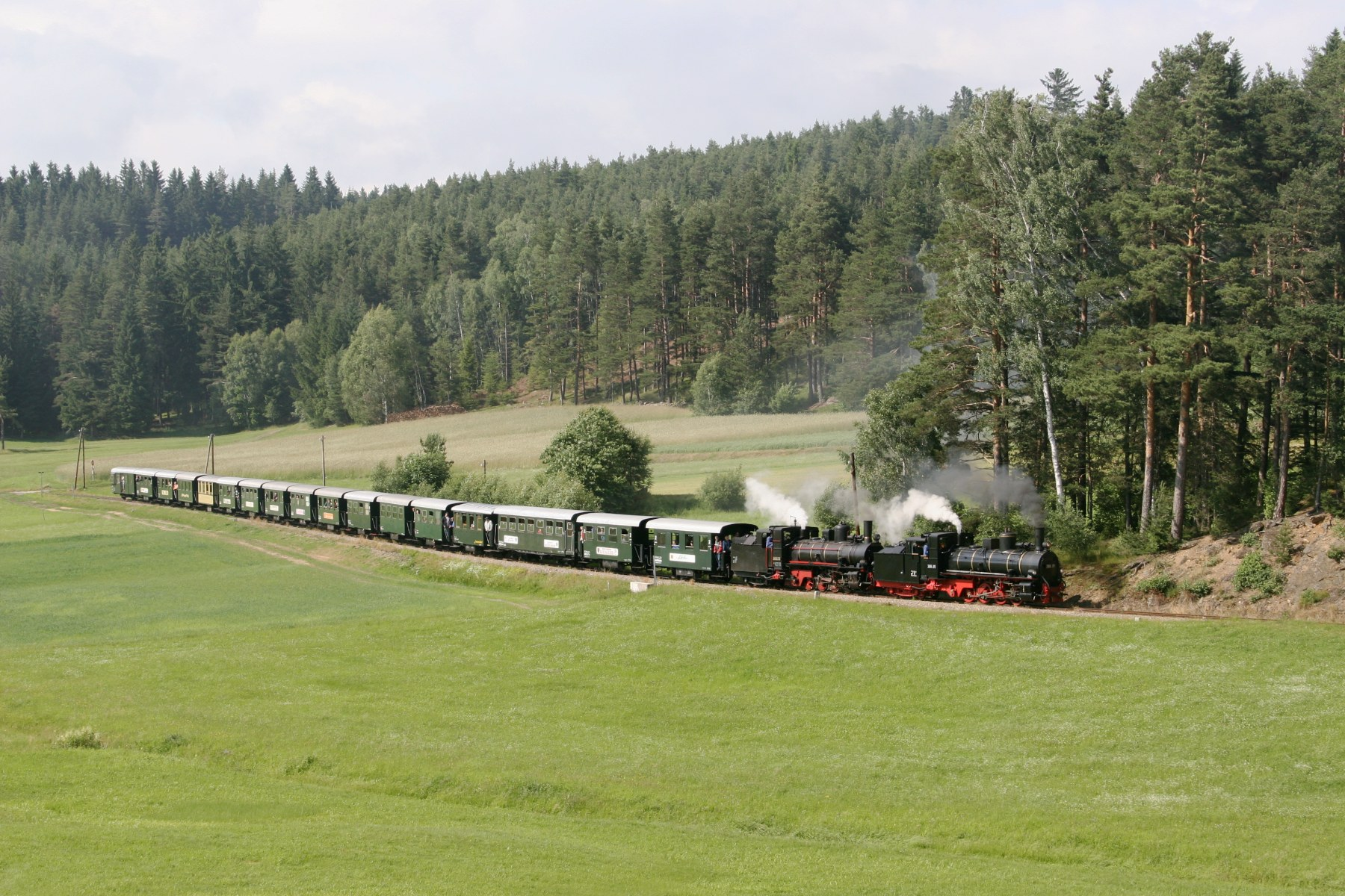 en: Class 399 double headed special on the Waldviertel Narrow Gauge Railways approaching Groß Gerungs, Lower Austria de: Doppeltraktion Reihe 399 mit Sonderzug auf den Waldviertler Schmalspurbahnen kurz vor Groß Gerungs